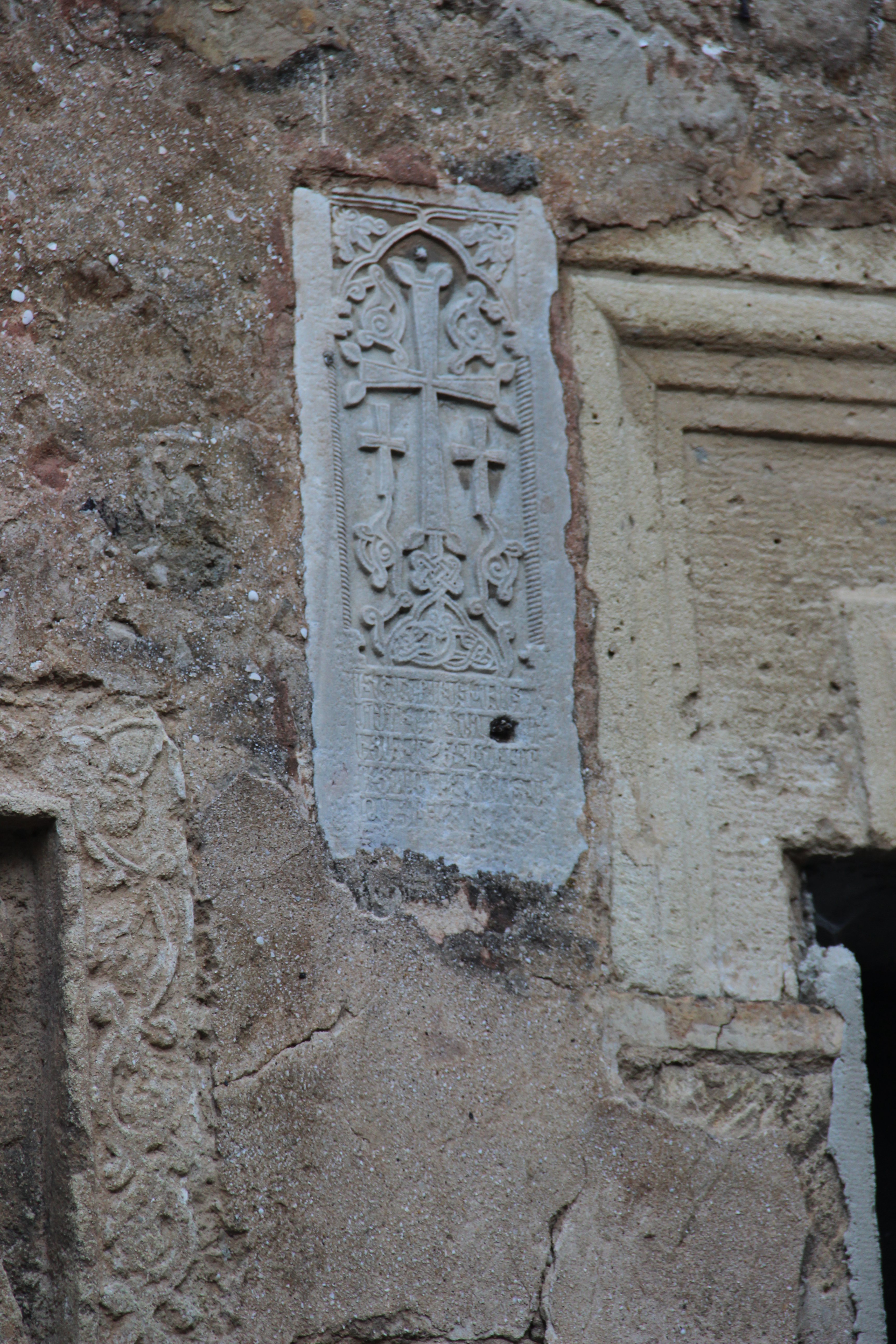 Хачкар (Камень с крестом). Церковь Сурб-Саркис. Феодосия. Крым. Россия. Сентябрь 2015